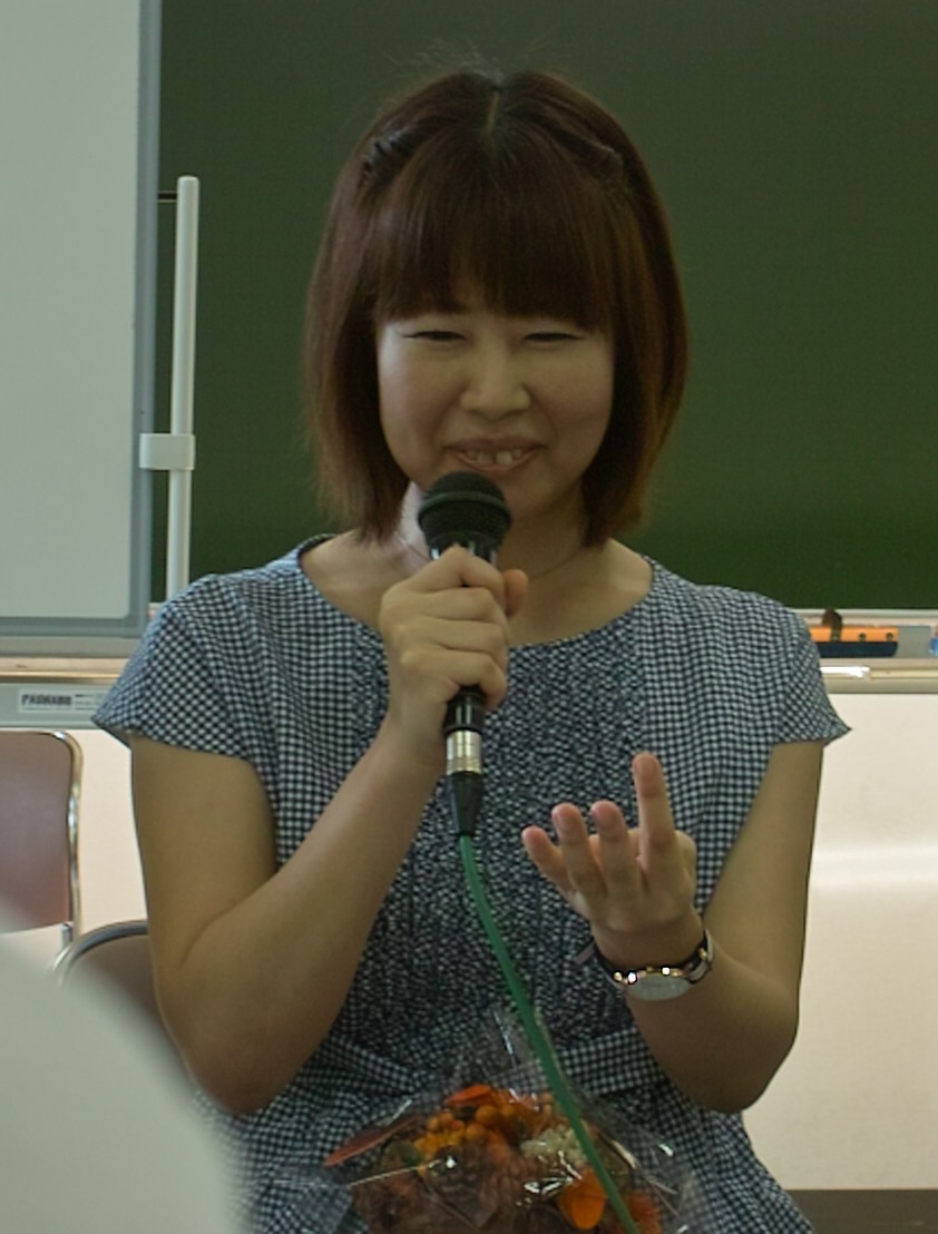 2016年10月2日、棋士会みやぎ復興将棋フェスティバルにて